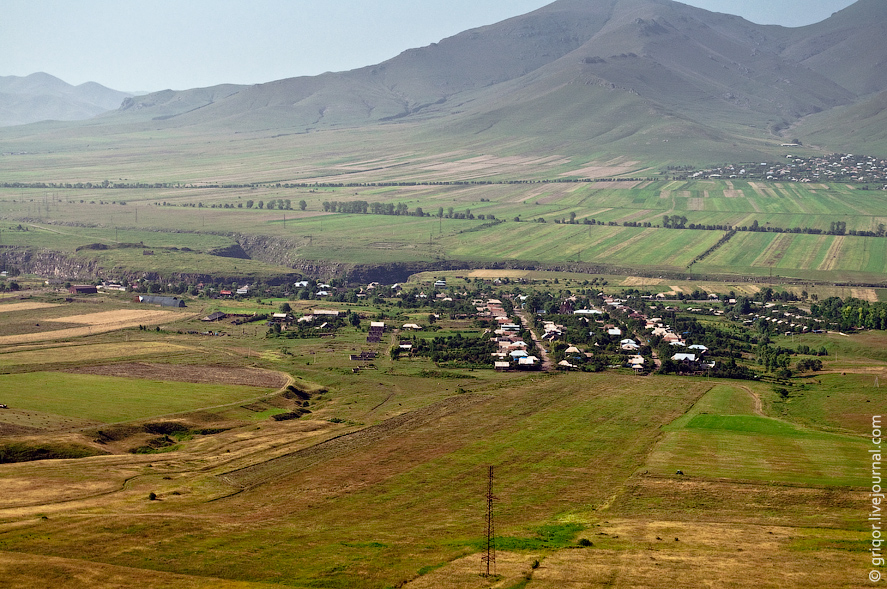 Село Амракиц